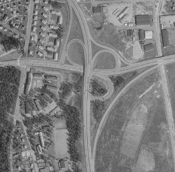 Historiska flygfoton från Lantmäteriet föreställandes Ljungarums trafikplats i Jönköping.